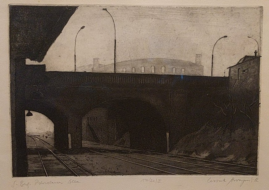 Der S-Bahnhof Prenzlauer Allee 1982, Berlin, Grafik von Ursula Strozynski. Im Hintergrund der letzte Gasometer der IV. Berliner Gasanstalt, 1984 gesprengt, heute Ernst-Thälmann-Park.